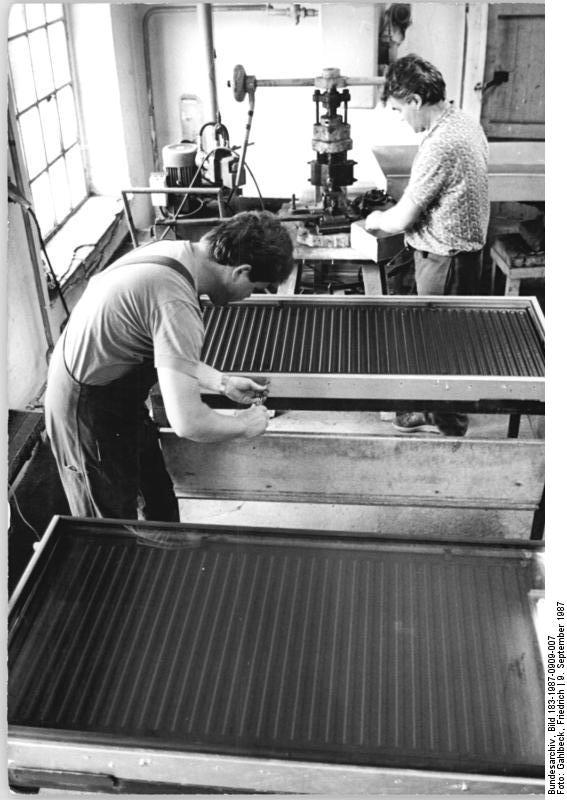 Pegau, VEB Rohrtechnik, Montage von Sonnenkollektoren ADN-ZB Gahlbeck 9.9.87 Bez. Leipzig: Sonnenkollektoren werden als zusätzliche Konsumgüter im Betriebsteil Pegau des VEB Rohrtechnik Delitsch hergestellt. Uwe John und Jürgen Tünpfel montiere die Kollektoren, die sich für die Erzeugung von warmen Wasser eignen. Sie werden bereits in Ferienobjekten genutzt. Die alternativen Energiequellen - jährlich werden 1000 Stück in Pegau hergestellt - können von der Bevölkerung über BHG-Verkaufsstellen bezogen werden.